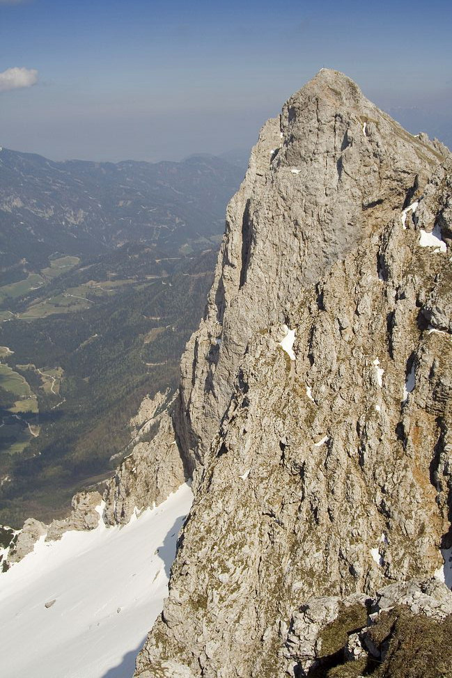 Košutnikov Turm - 2136m